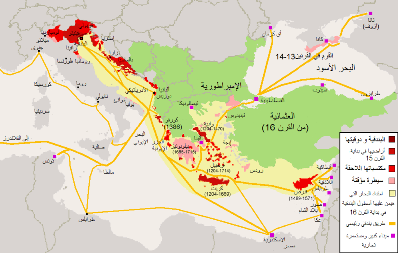 توسعات جمهورية البندقية في القرنين الخامس عشر والسادس عشر